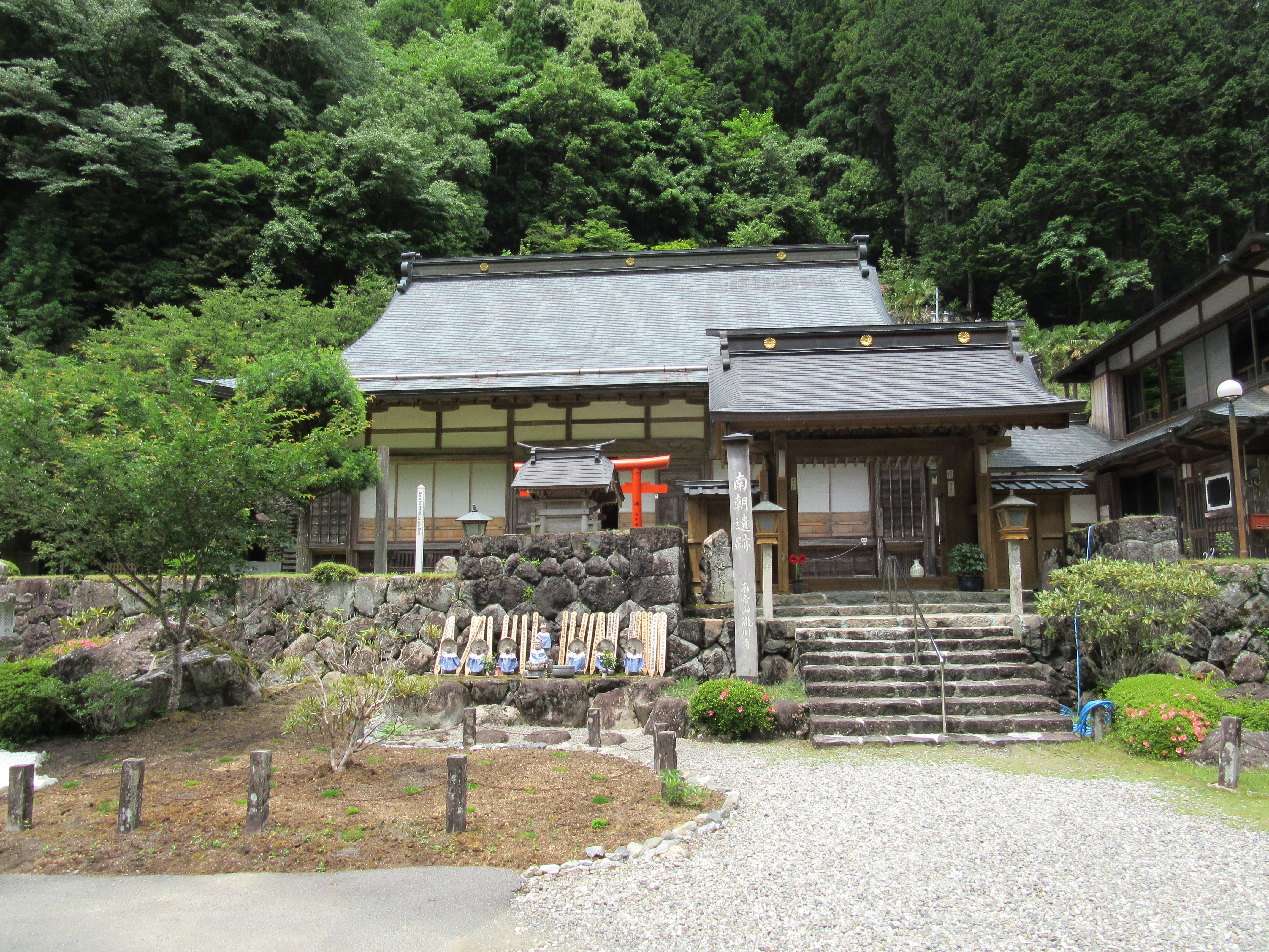 上北山村小橡・瀧川寺